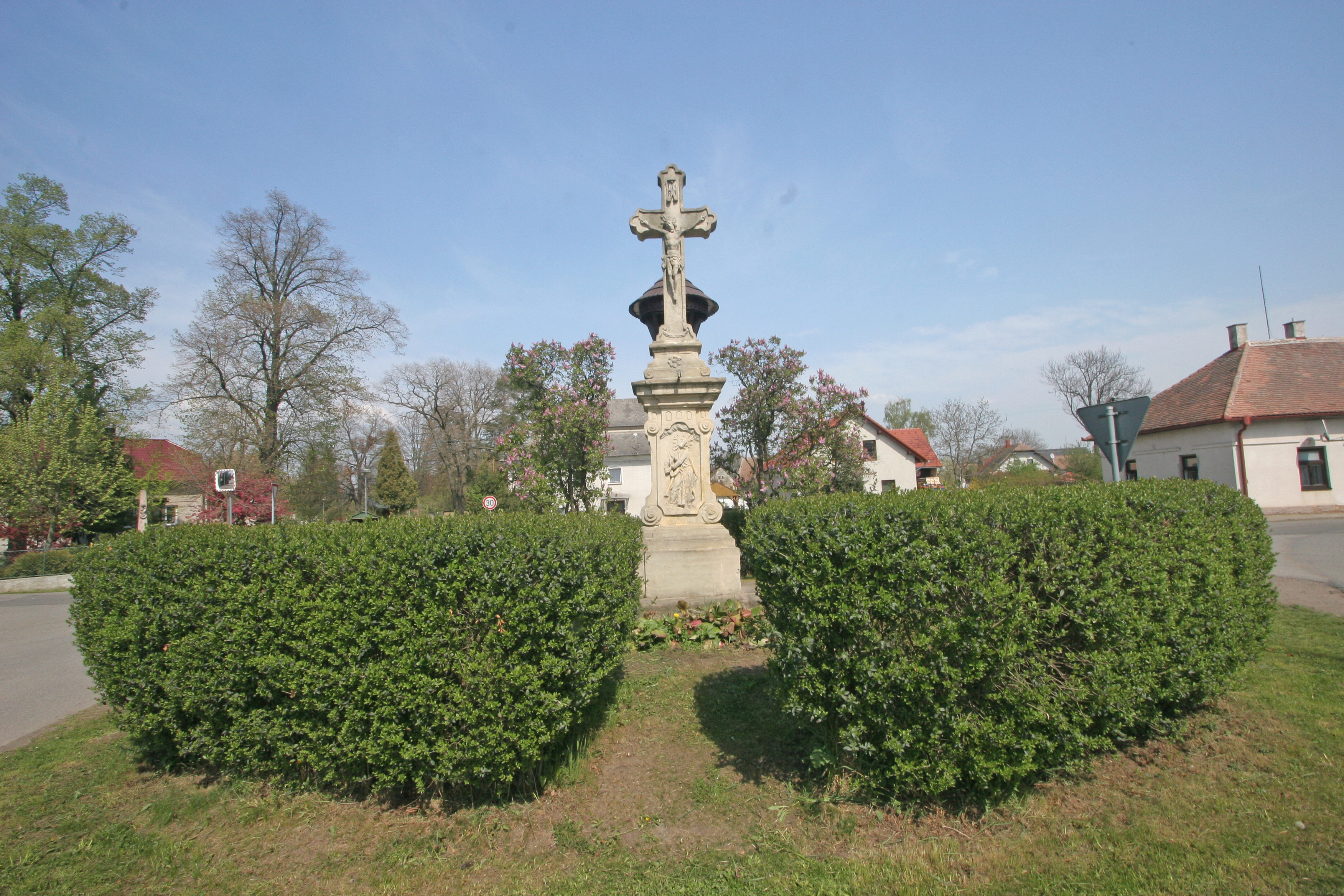 Bylany křížek